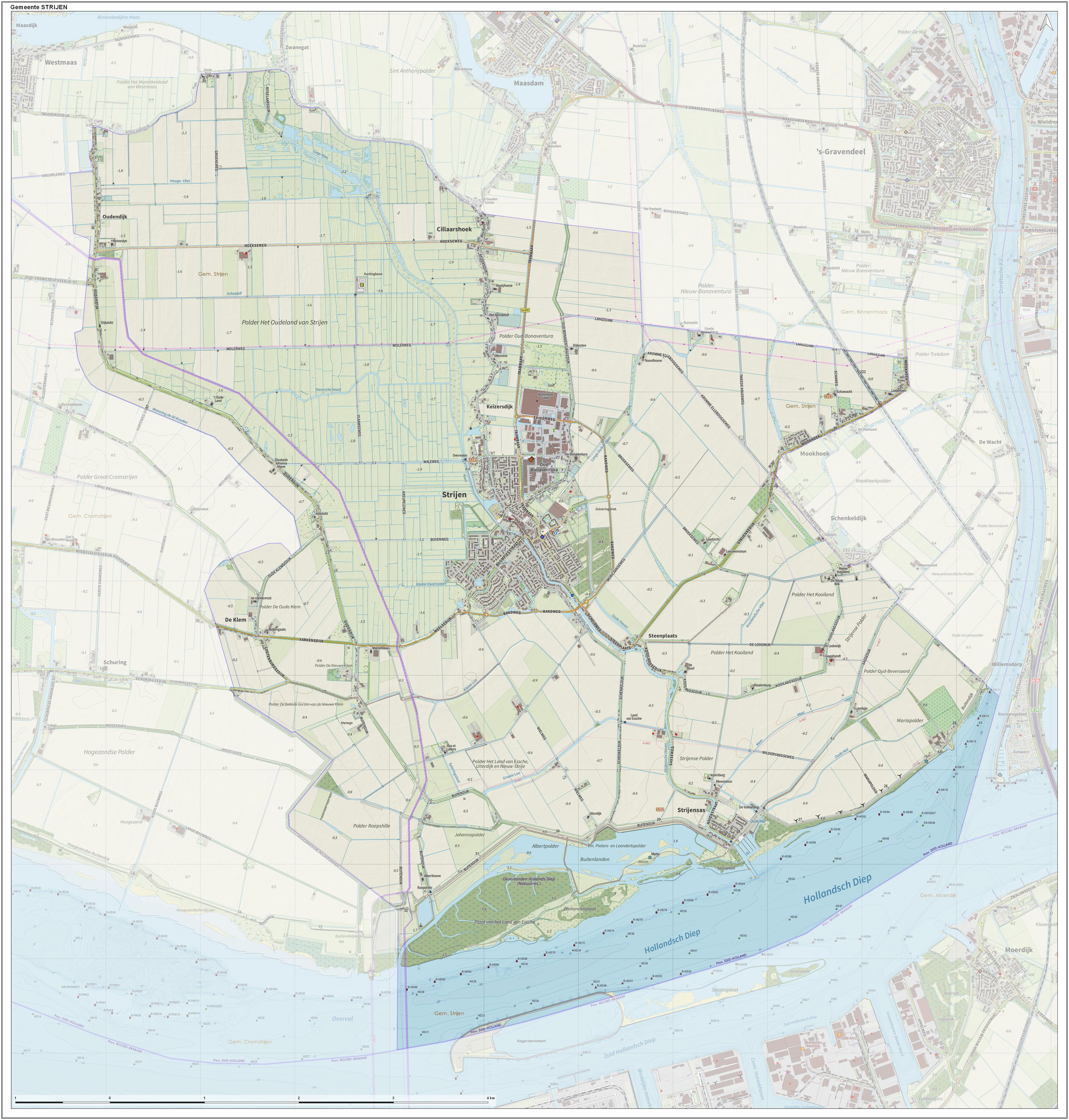 Topografische gemeentekaart. Resolutie: 400 pixels/km. Kaartbeeld samengesteld uit de open geodata van de Top10NL en Top25namen (Kadaster), Creative Commons-BY licentie. Gebouwvlakken uit open geodata BAG extract. Wegen uit de OpenStreetMap, OpenStreetMap community. Reliëfschaduw uit de Actuele Hoogtekaart AHN2. Samenstelling en kleurenschema: Jan-Willem van Aalst, met QGIS. Zie ook de Legenda.